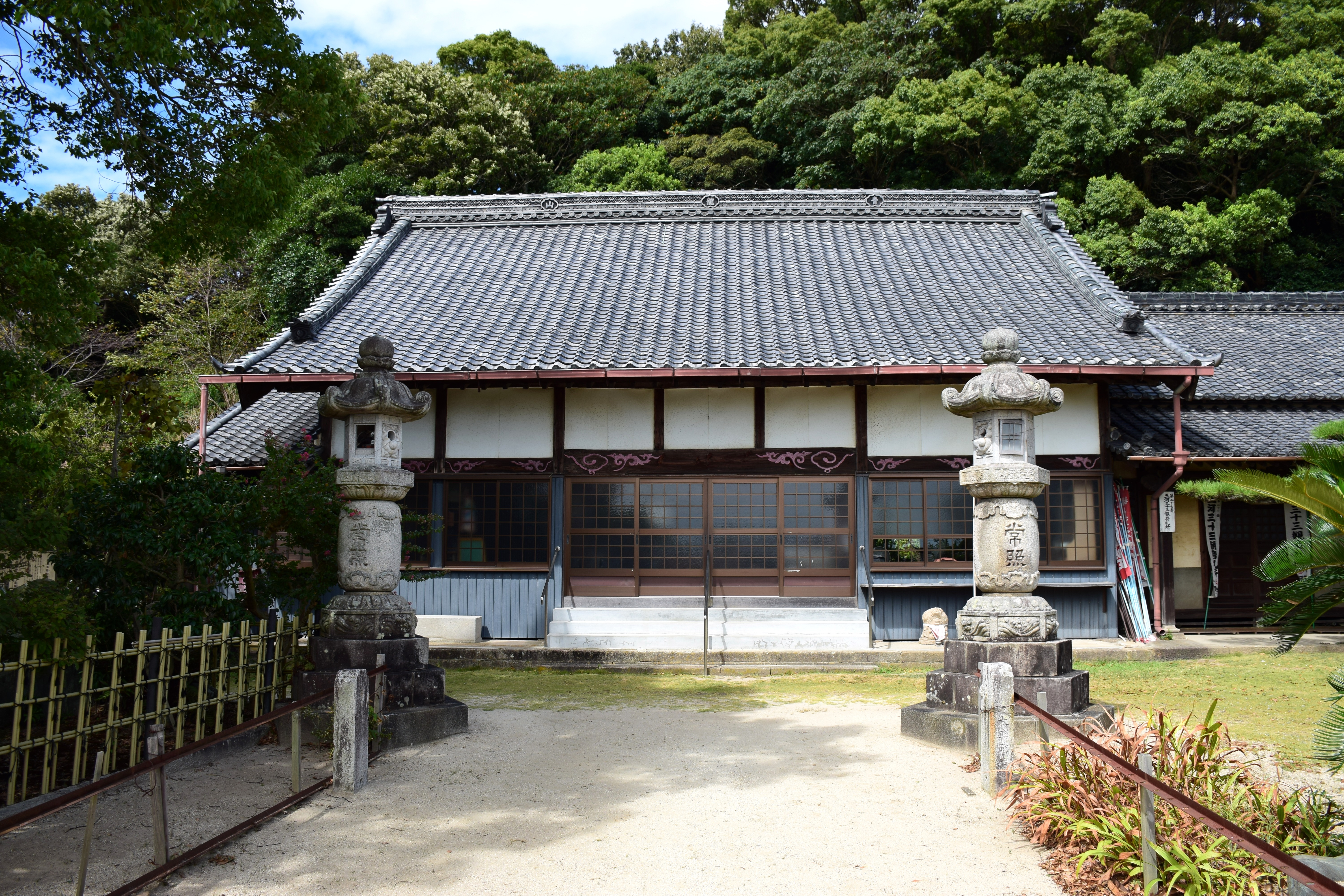 金蓮寺本堂